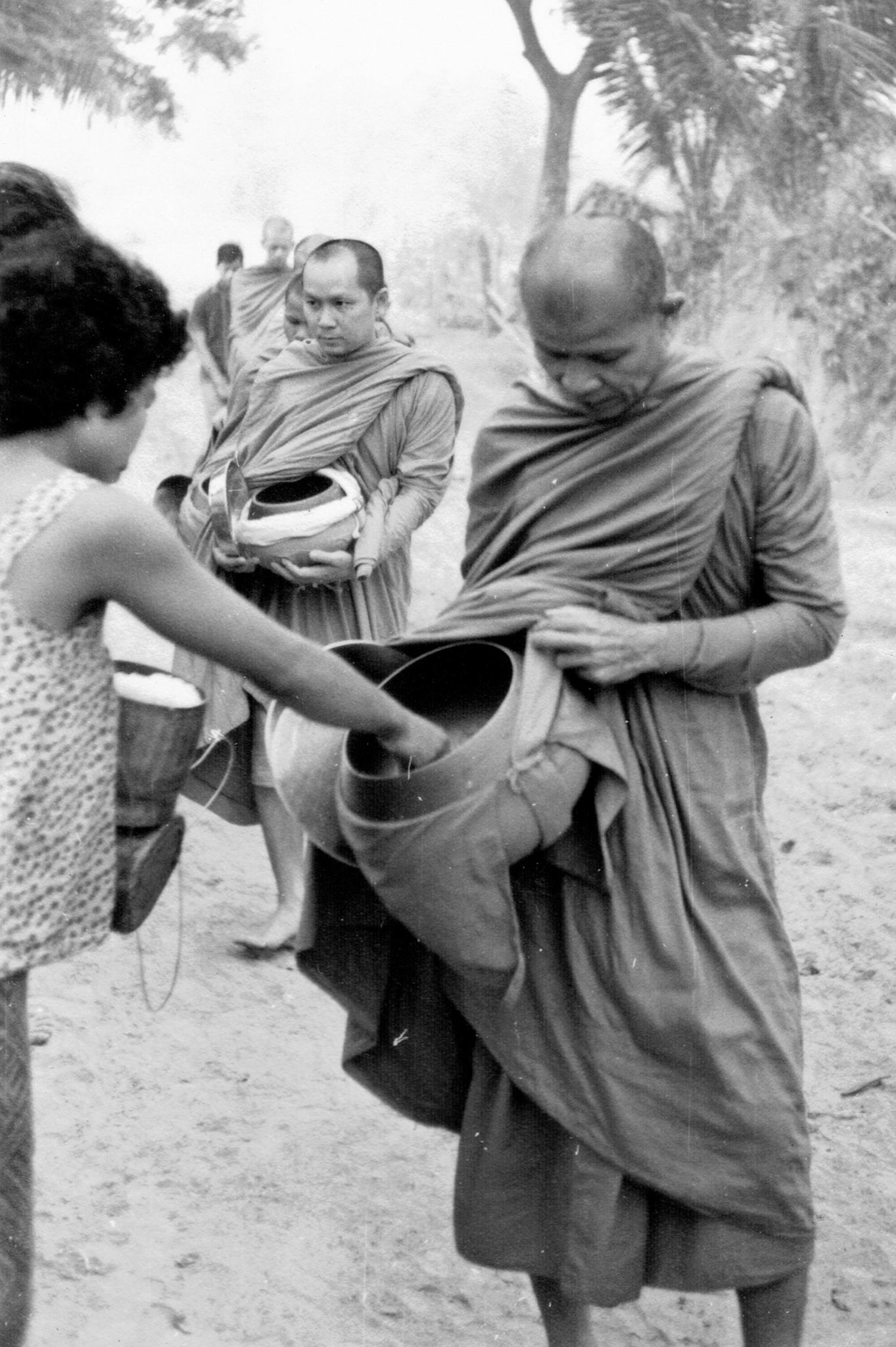 ท่านอาจารย์มหาบัว (ท่านเจ้าคุณธรรมวิสุทธิมงคล) กำลังรับบาตร ถัดออกไปข้างหลังคือพระมหาอัมพร อัมพโร (สมณศักดิ์ปัจจุบันคือสมเด็จพระอริยวงศาคตญาณ สมเด็จพระสังฆราชองค์ที่ 20 ของประเทศไทย) บันทึกภาพที่บ้านตาด จังหวัดอุดรธานี เมื่อ เดือนเมษายน พ.ศ. 2508 โดย หม่อมหลวงชัยนิมิตร นวรัตน ภาพดังกล่าวนี้เจ้าของภาพอนุญาตให้เผยแพร่ทั่วไปได้ ดังปรากฎข้อความในสถานะเว็บไซต์เฟซบุ๊ค "ม.ล. ชัยนิมิตร นวรัตน" วันที่ 8 กุมภาพันธ์ พ.ศ. 2560 ดังนี้ "ภาพประวัติศาสตร์ผมถ่ายเองเมื่ออายุ ๑๖ ลิขสิทธิ์มี แต่สำหรับผู้ที่ศรัทธานับถือสมเด็จพระสังฆราชอัมพรมหาเถระ สามารถนำไปเผยแพร่ต่อได้เลยครับไม่จำเป็นต้องขอ แต่ใครเอาไปใช้แล้ว โปรดอย่าไปอ้างตนเป็นเจ้าเข้าเจ้าของเสียเองก็แล้วกัน"